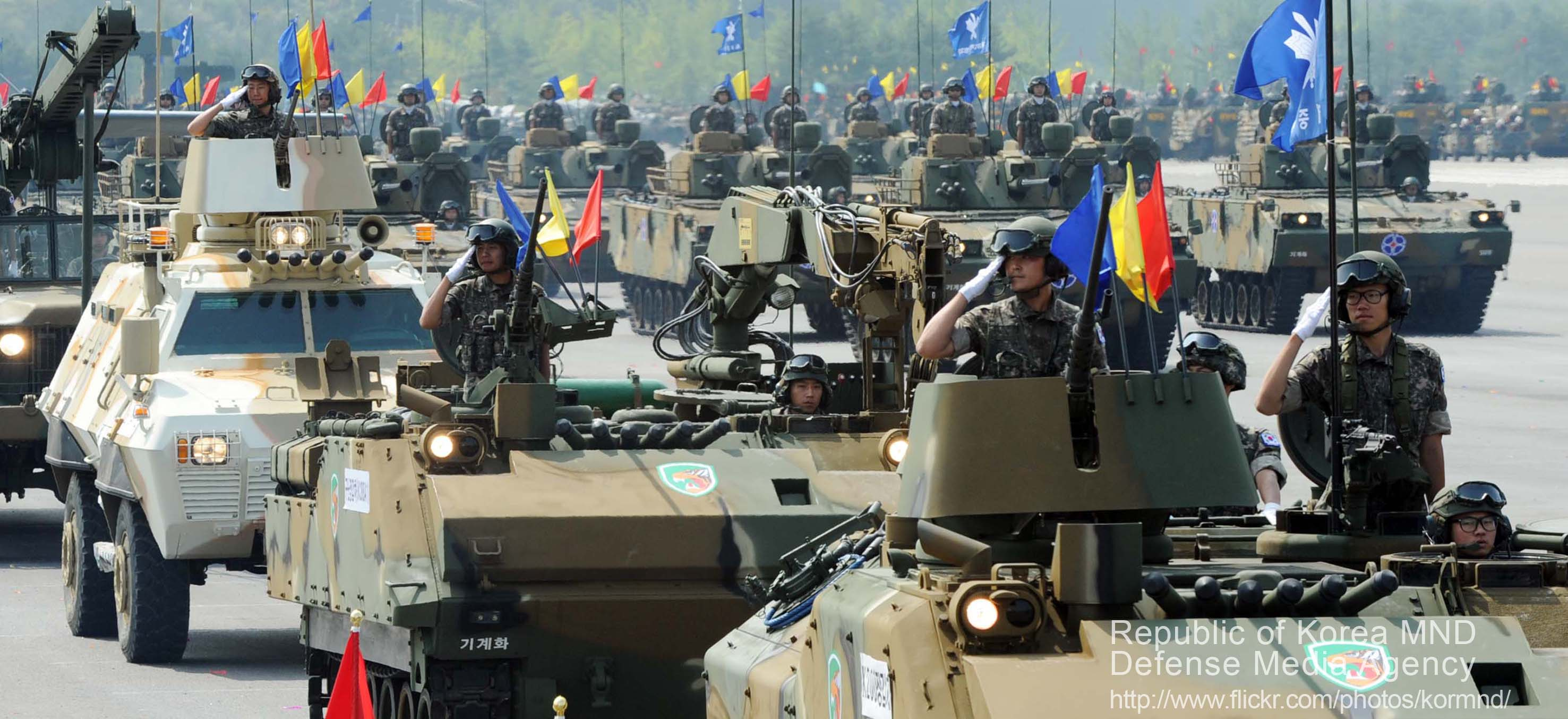 촬영 - 김태형 기자